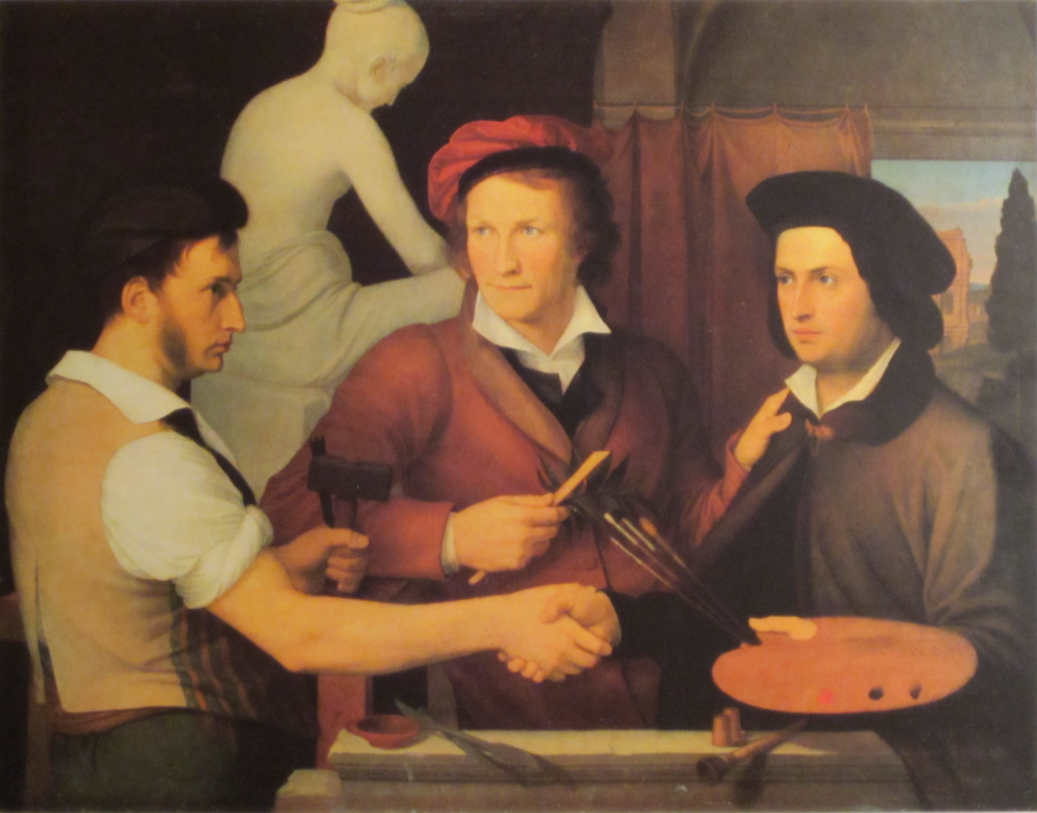 links Rudolf Schadow, in der Mitte Bertel Thorvaldsen, rechts Wilhelm von Schadow